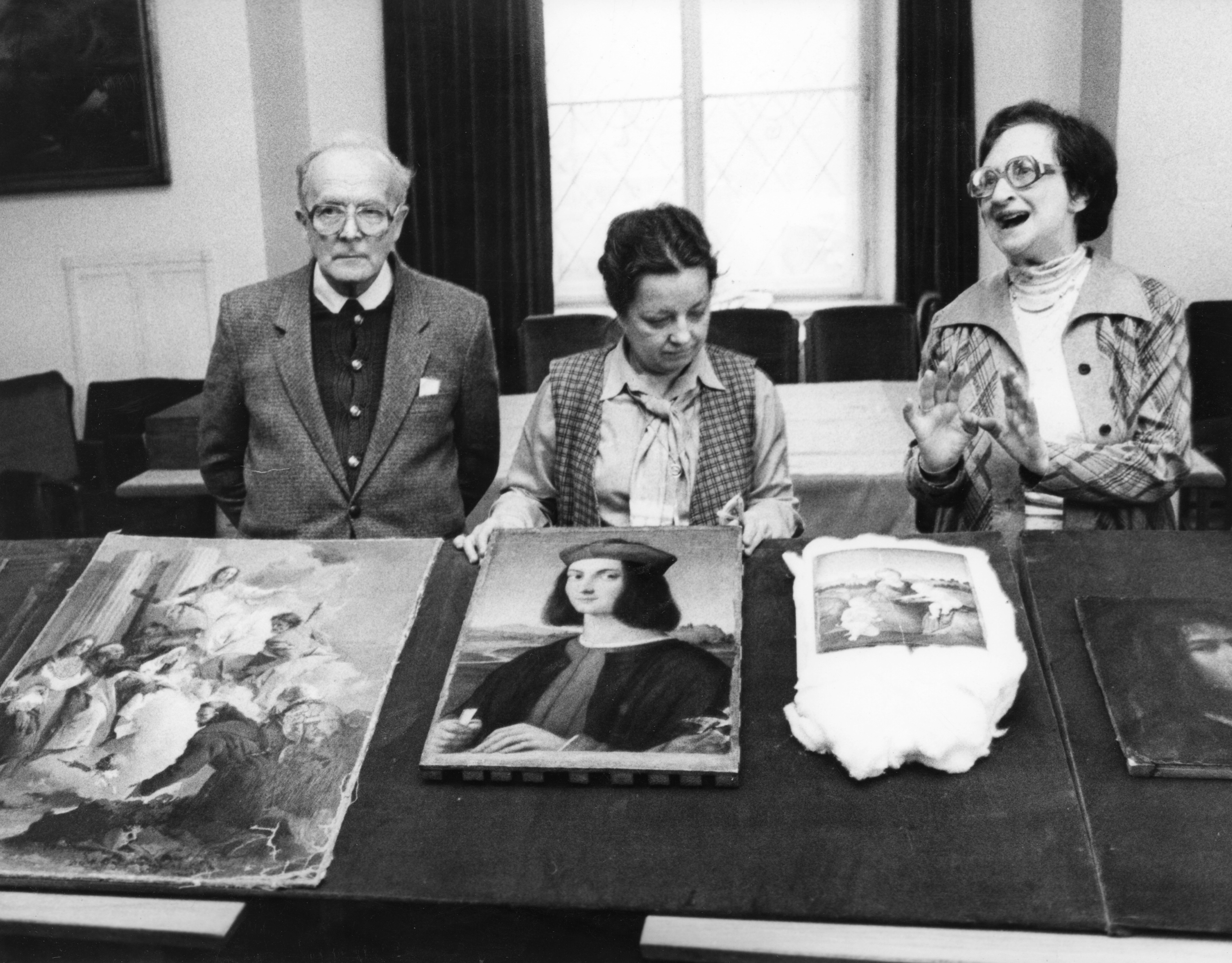 Szépművészeti Múzeum, az 1983-ban ellopott majd megtalált festmények. Jobbra Dr. Garas Klára főigazgató. Location: Hungary, Budapest XIV. Tags: art theft, Budapest, painting Title: Szépművészeti Múzeum, az 1983-ban ellopott majd megtalált festmények. Jobbra Dr. Garas Klára főigazgató.